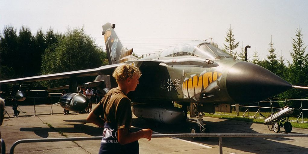 Beschreibung: Panavia Tornado in Laage Image taken by Darkone